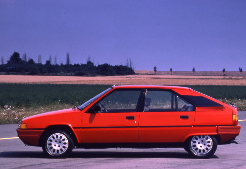 Dessinée par M. Gandini de la Carrozzeria Bertone et lancée en 1982 la BX, ici une phase I, connut un succès appréciable pendant plus d'une décennie, malgré une finition perfectible. Louée pour sa ligne futuriste, sa légèreté et ses qualités de confort/tenue de route propres à la marque, elle cède la place à la Xantia en 94 après plus de 2,3 millions d'exemplaires écoulés.